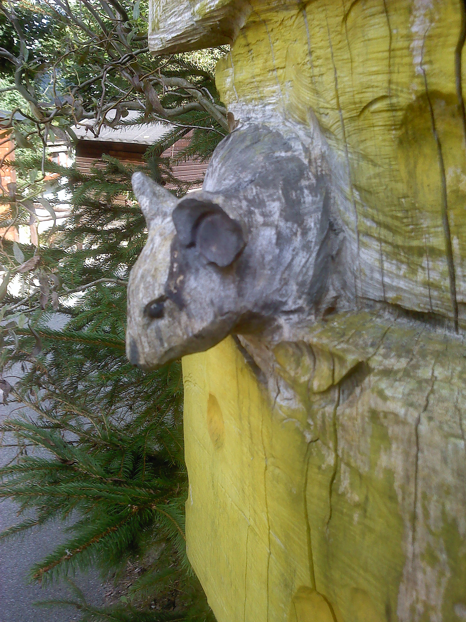 Tiergarten Aue, hölzerner Wegweiser mit geschnitztem Mauskopf